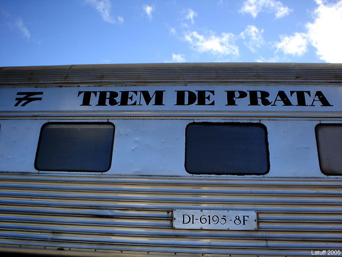 Vagão abandonado do antigo Trem de Prata, estacionado a céu aberto na estação Francisco Bernardino em Juz de Fora - MG.